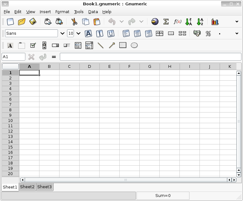 gnumeric 1.6 en anglais interface gtk2 avril 2006 Licensing Catégorie:Image de logiciel libre